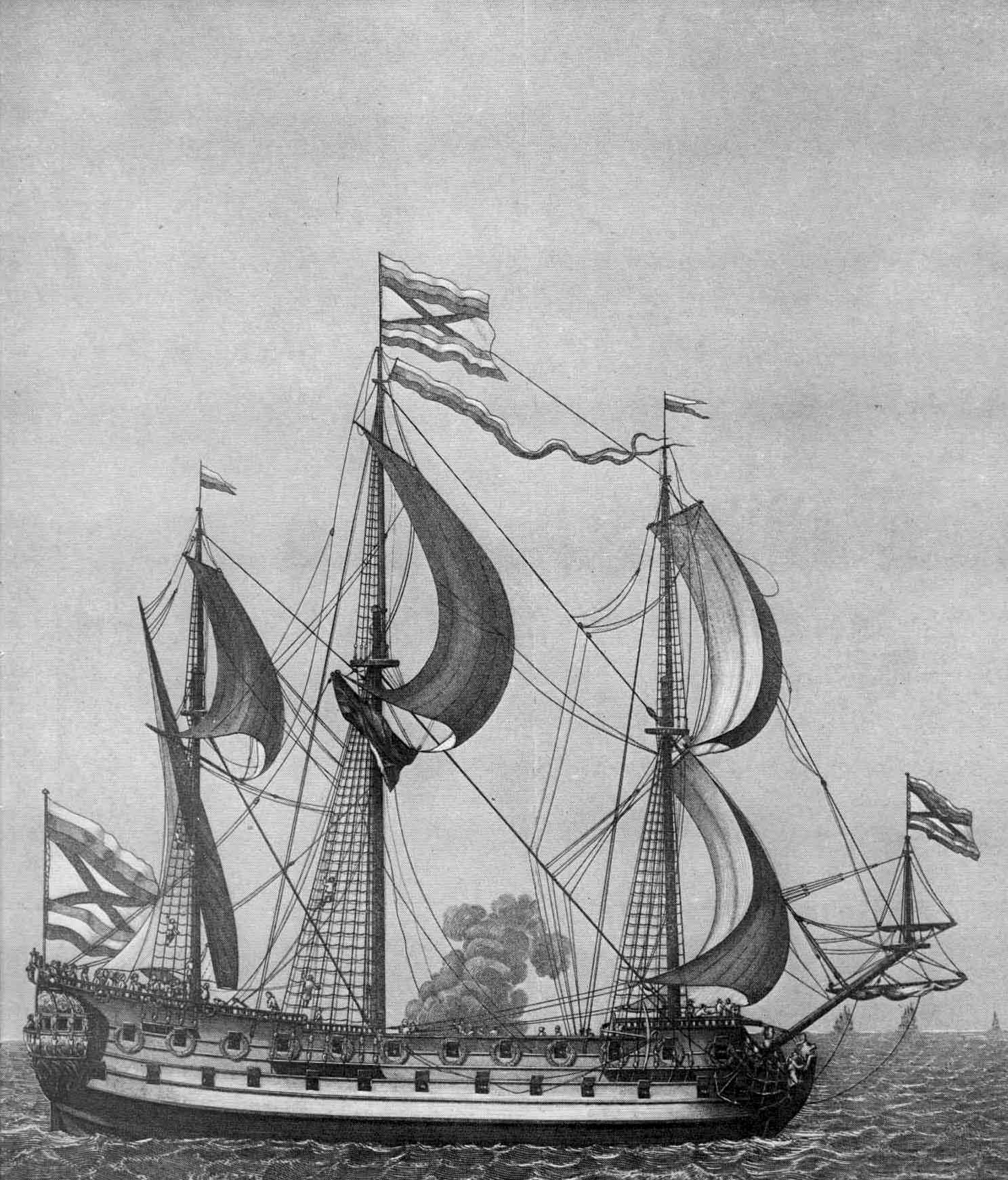 Гравюра, изображающая первый российский линейный корабль "Гото Предестинация". При торжественном спуске на воду на судне был поднят флаг, освящённый в Адмиралтейской церкви (бывшей Успенской церкви).